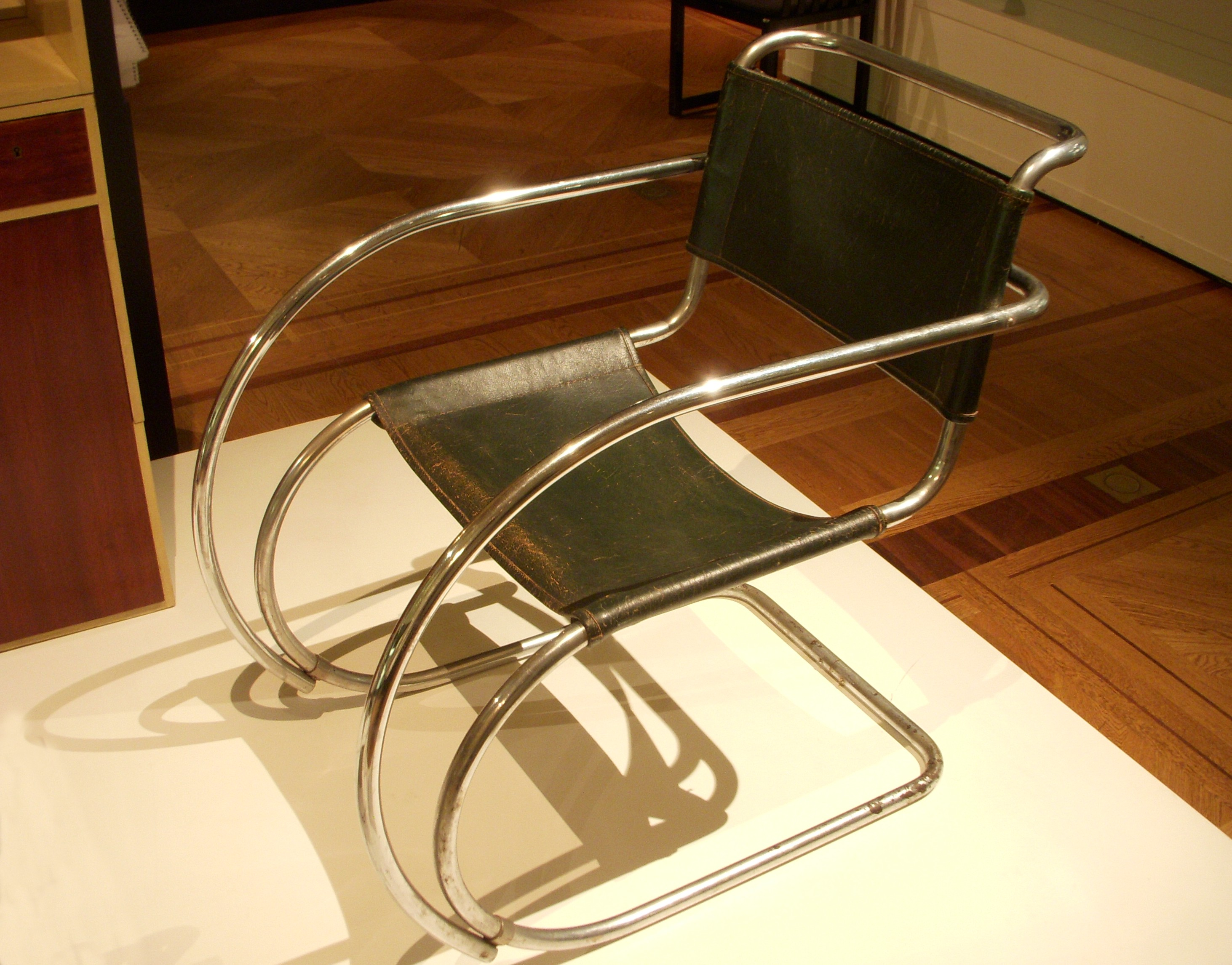 Mies van der Rohes karmstol från 1927